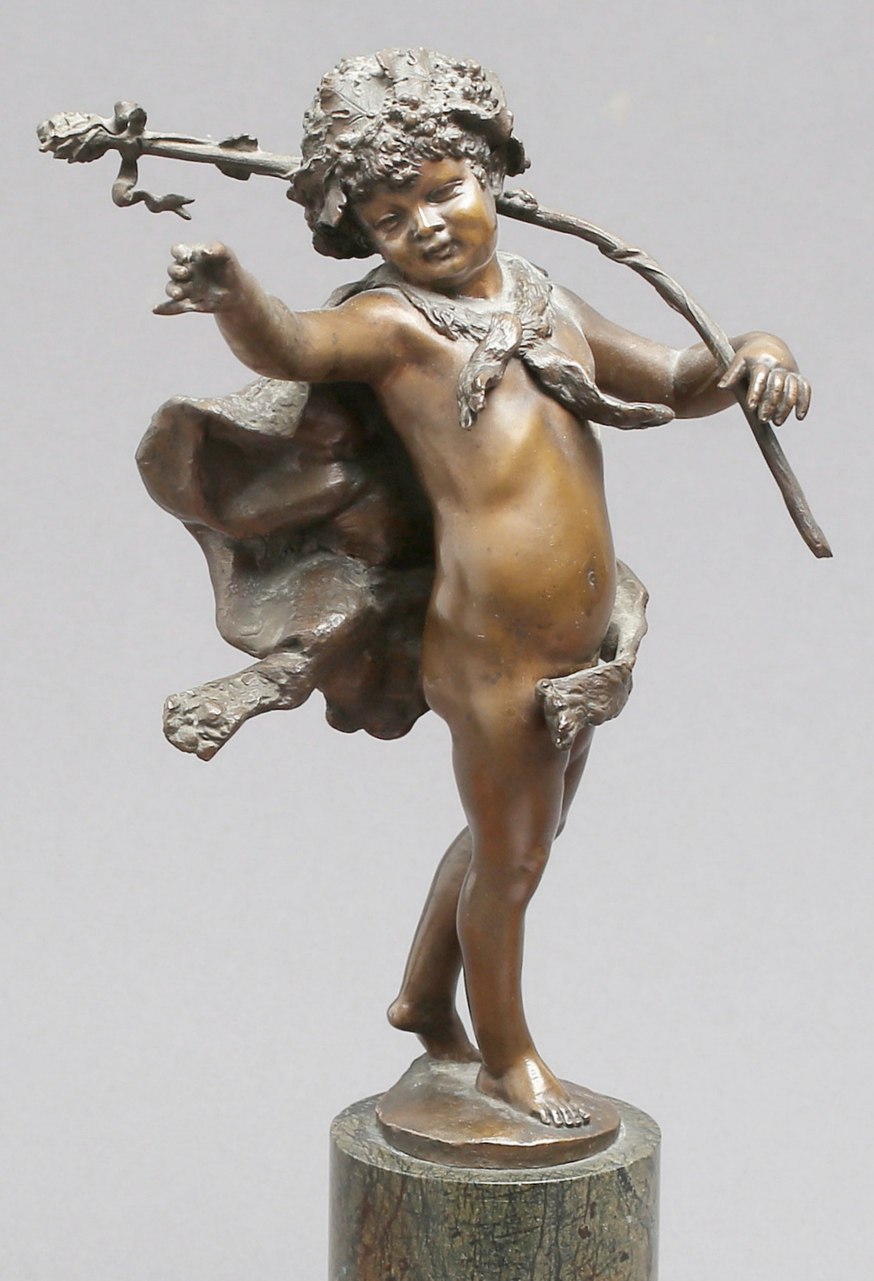 Junger Bacchus oder Bacchant. Die Statuette lehnt sich deutlich an Michelangelos Bacchus an: Trauben, Efeu, Raubtierfell, Trinkschale (nicht mehr vorhanden)